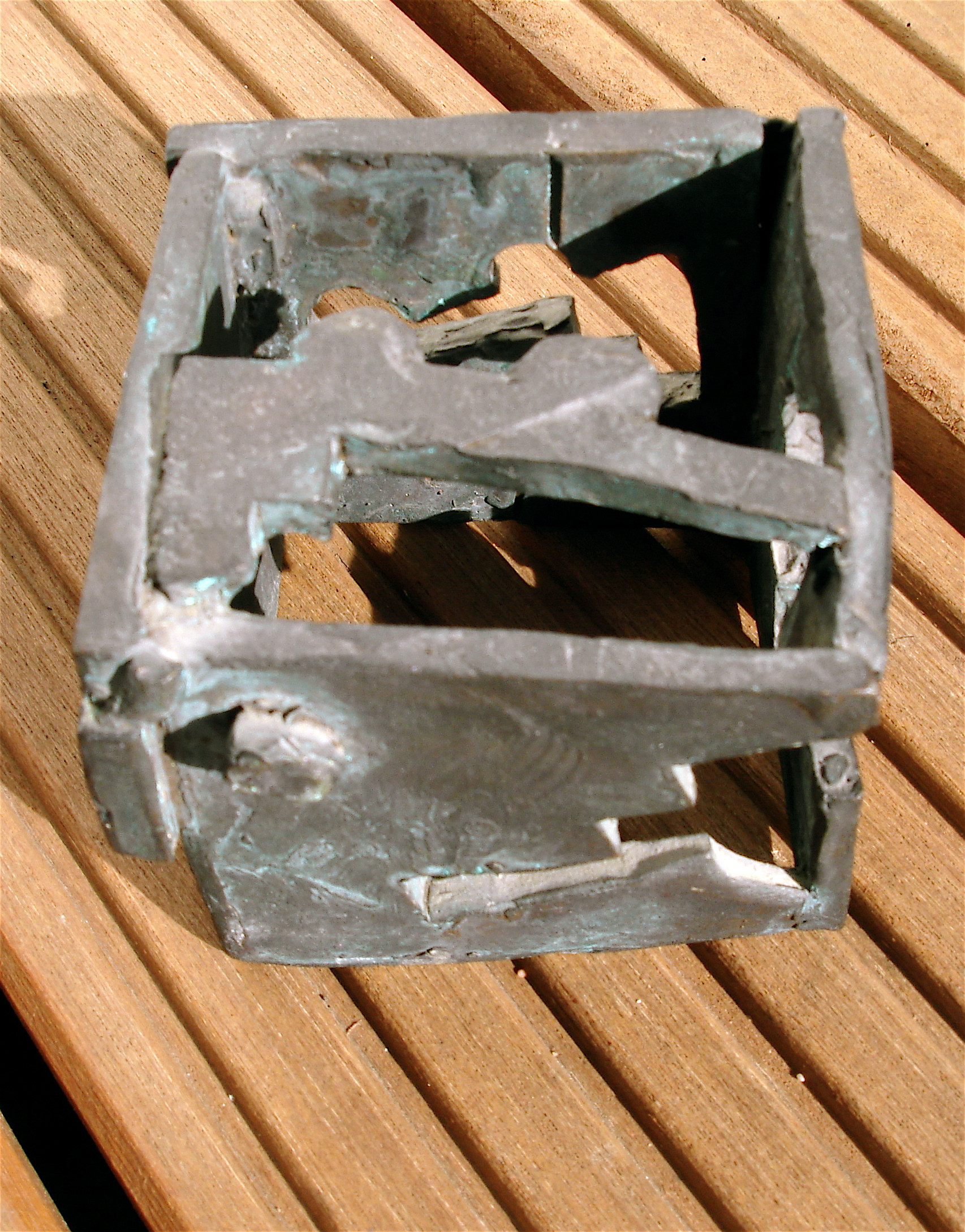 Gedankenhaus Skulptur